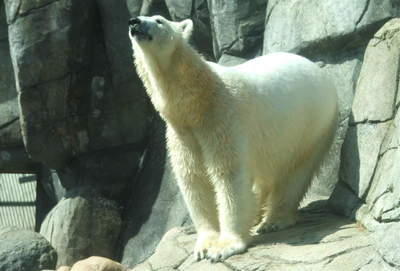 Polar bear - Aalborg Zoo, Denmark